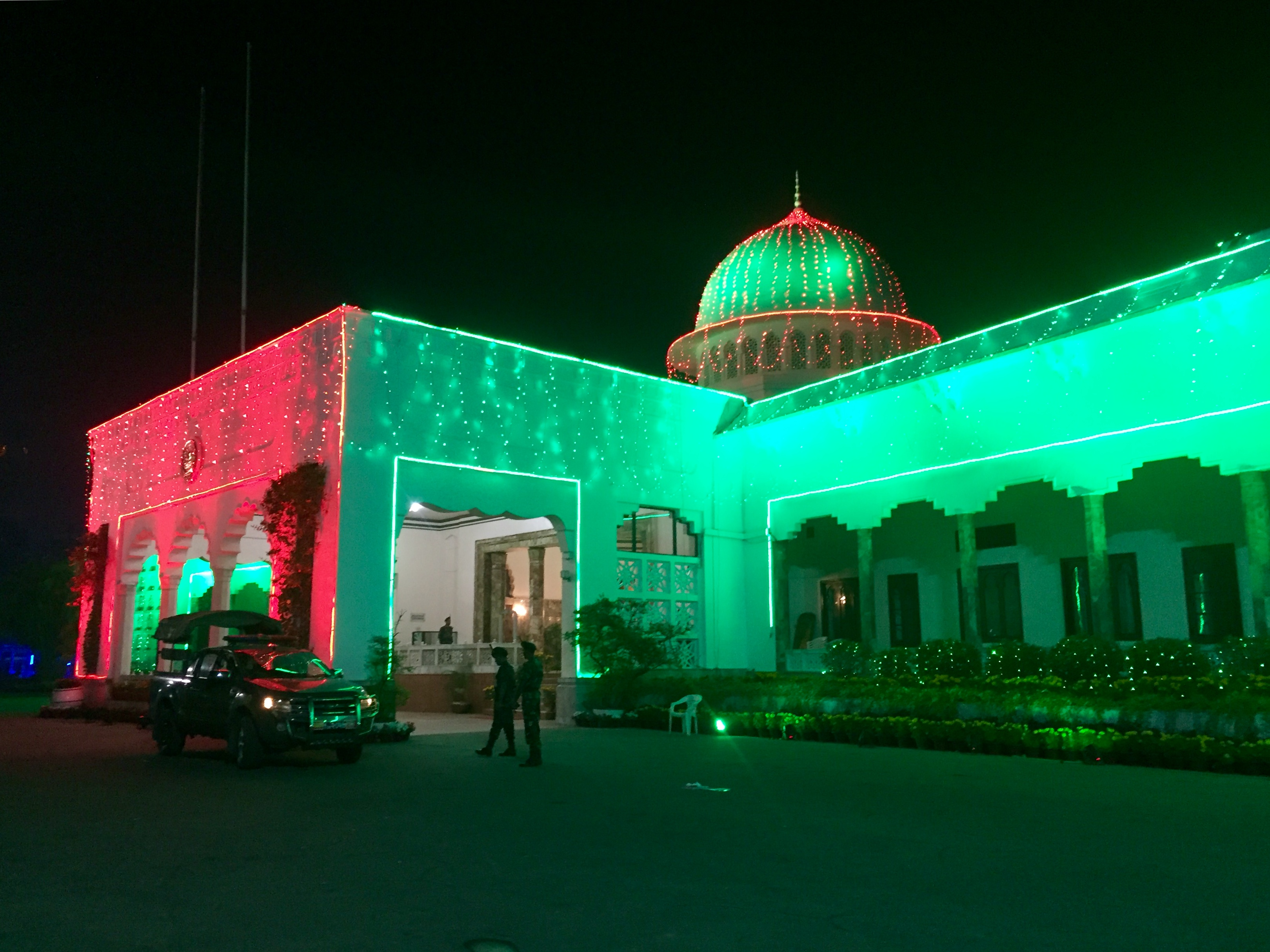 বঙ্গভবন, গণপ্রজাতন্ত্রী বাংলাদেশ সরকারের মহামান্য রাস্ট্রপতির বাসভবন।